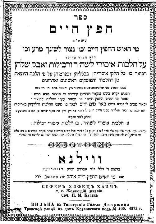 דף השער של הספר "חפץ חיים" לישראל מאיר הכהן כגן מראדין. הודפס בווילנה 1873.